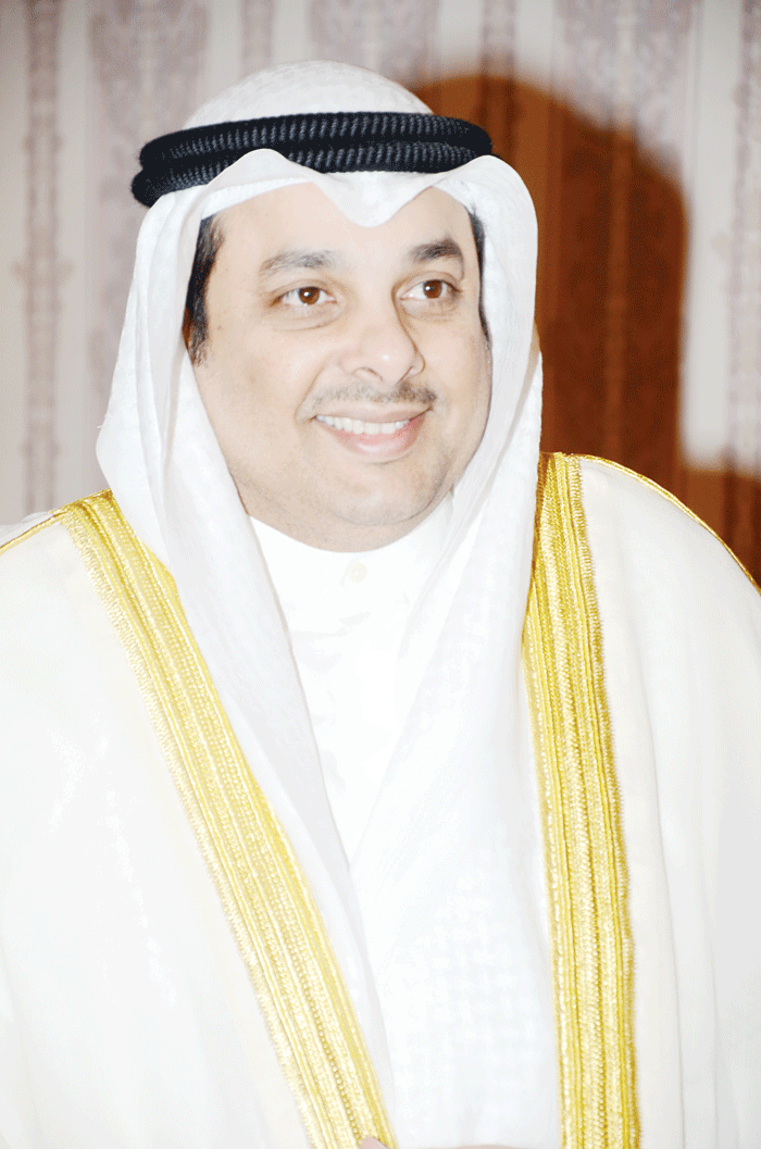 حين توليه الوزارة